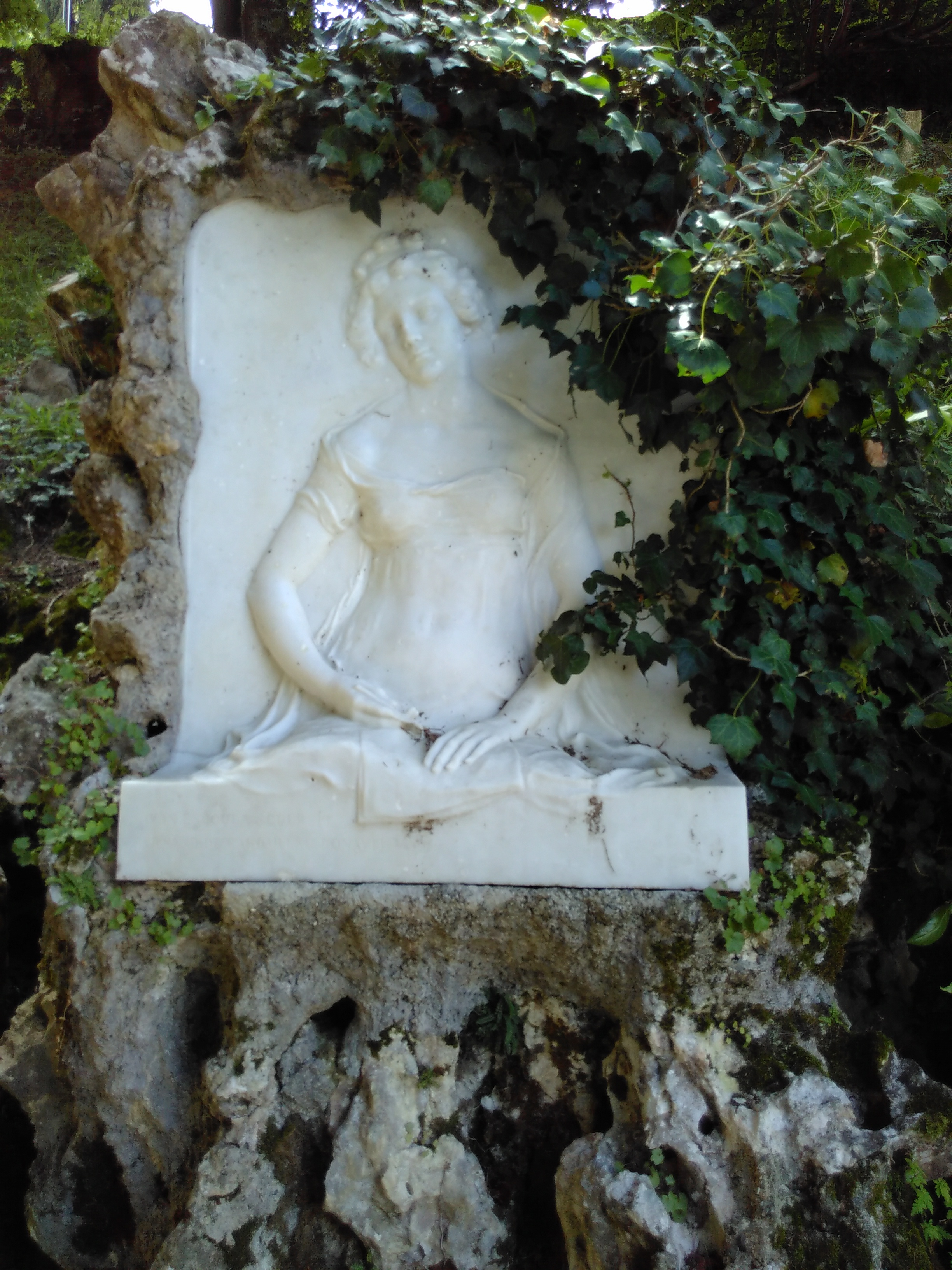 Buste bas-relief de 1910, en marbre, de Sophie Cottin, écrivaine (1770-1807), par Jean Escoula (1851-1911) exposé à Bagnères-de-Bigorre.